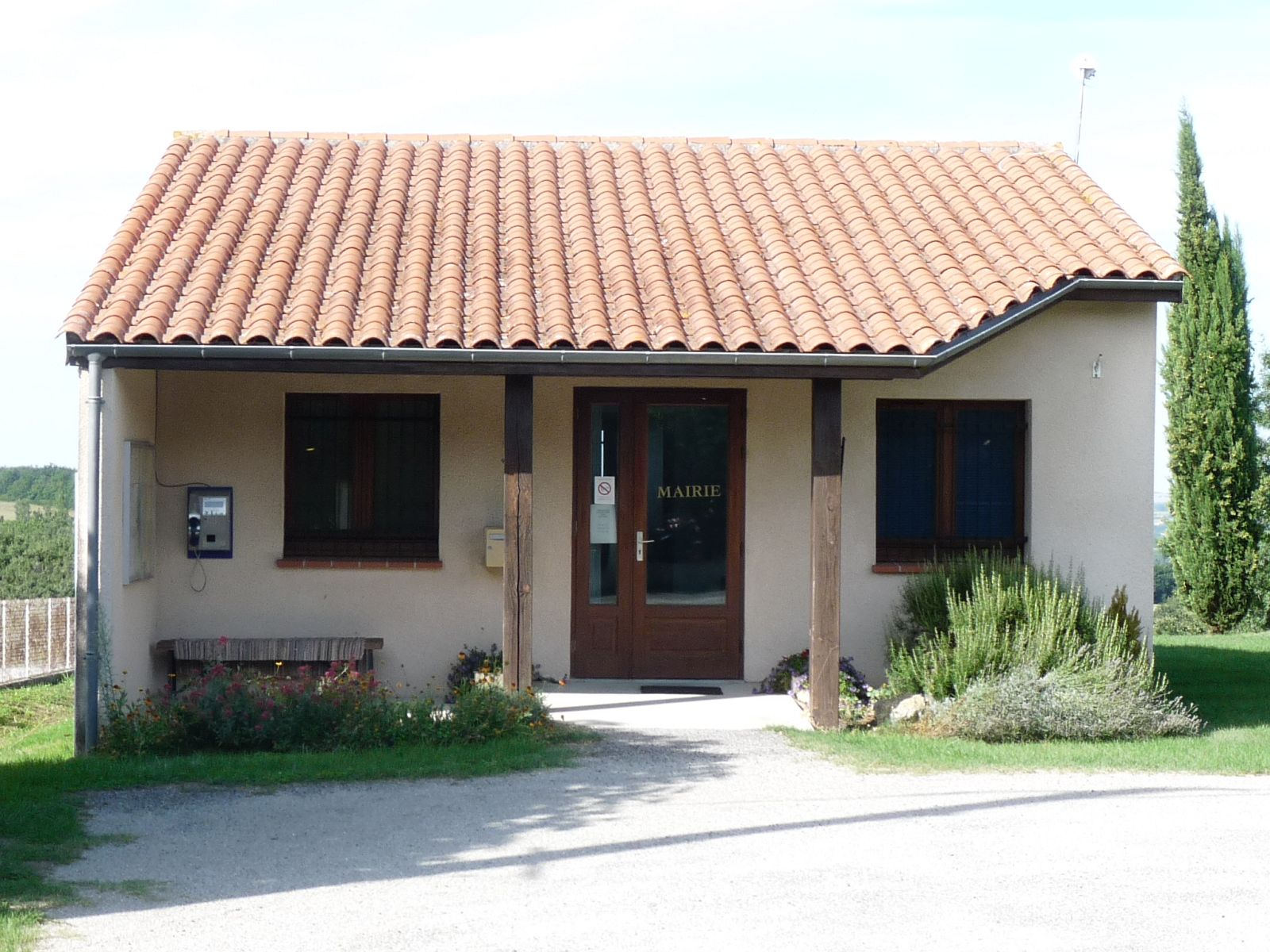 Mairie de Seyre, Haute-Garonne, France